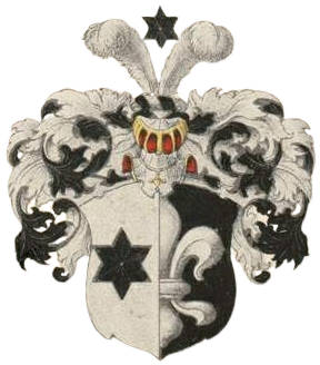 Siversi suguvõsa aadlivapp